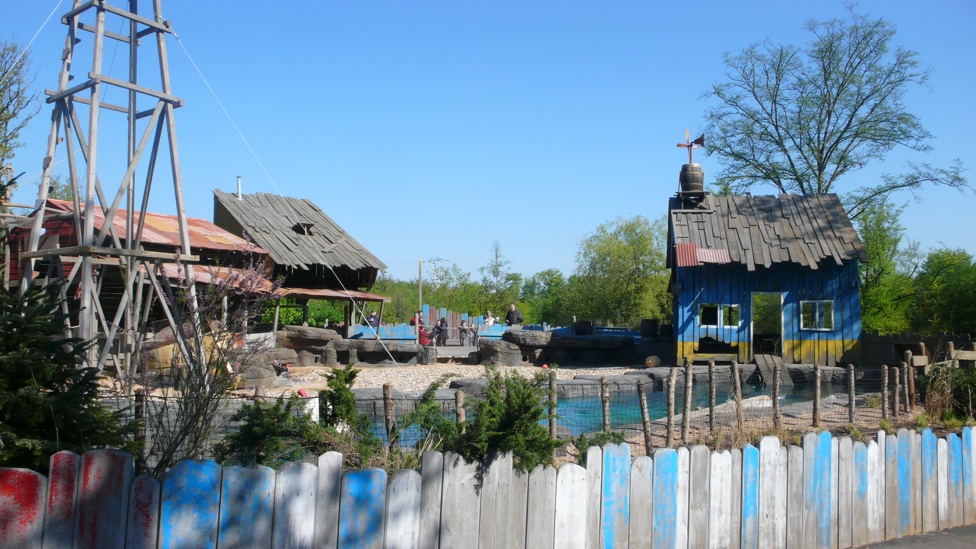 La société AAB a réalisé les décors de l'enclos des manchots du zoo d'Amnéville.